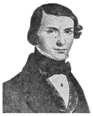 Ion Codru-Drăgușanu (născut în 1817[1], la Drăguș, Comitatul Făgăraș, azi județul Brașov, Transilvania – decedat la 25 octombrie 1884, Sibiu) a fost un scriitor român, memorialist, călător, participant la Revoluția de la 1848 - 1849, vicecăpitan al Comitatului Făgăraș. A fost bunicul matern al deputatului Ion Rațiu.